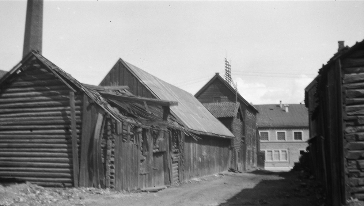 Trehusbebyggelse lagerbygninger annen ladegang, 1923. Foto: K. Almås / Oslo Museum